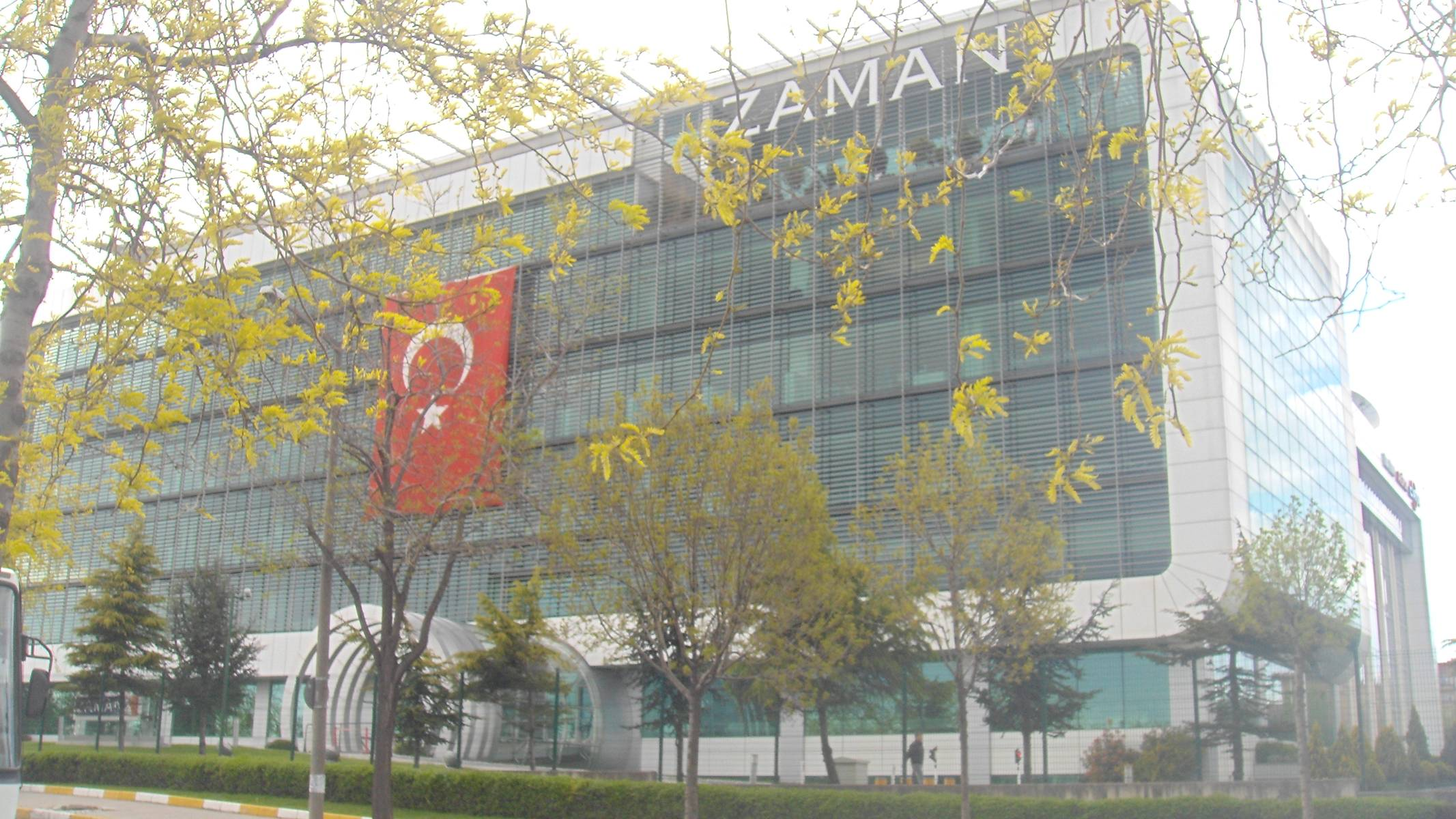 İstanbul ili Bahçelievler ilçesi Yenibosna semtinde bulunan Zaman gazetesi genel müdürlüğü binası